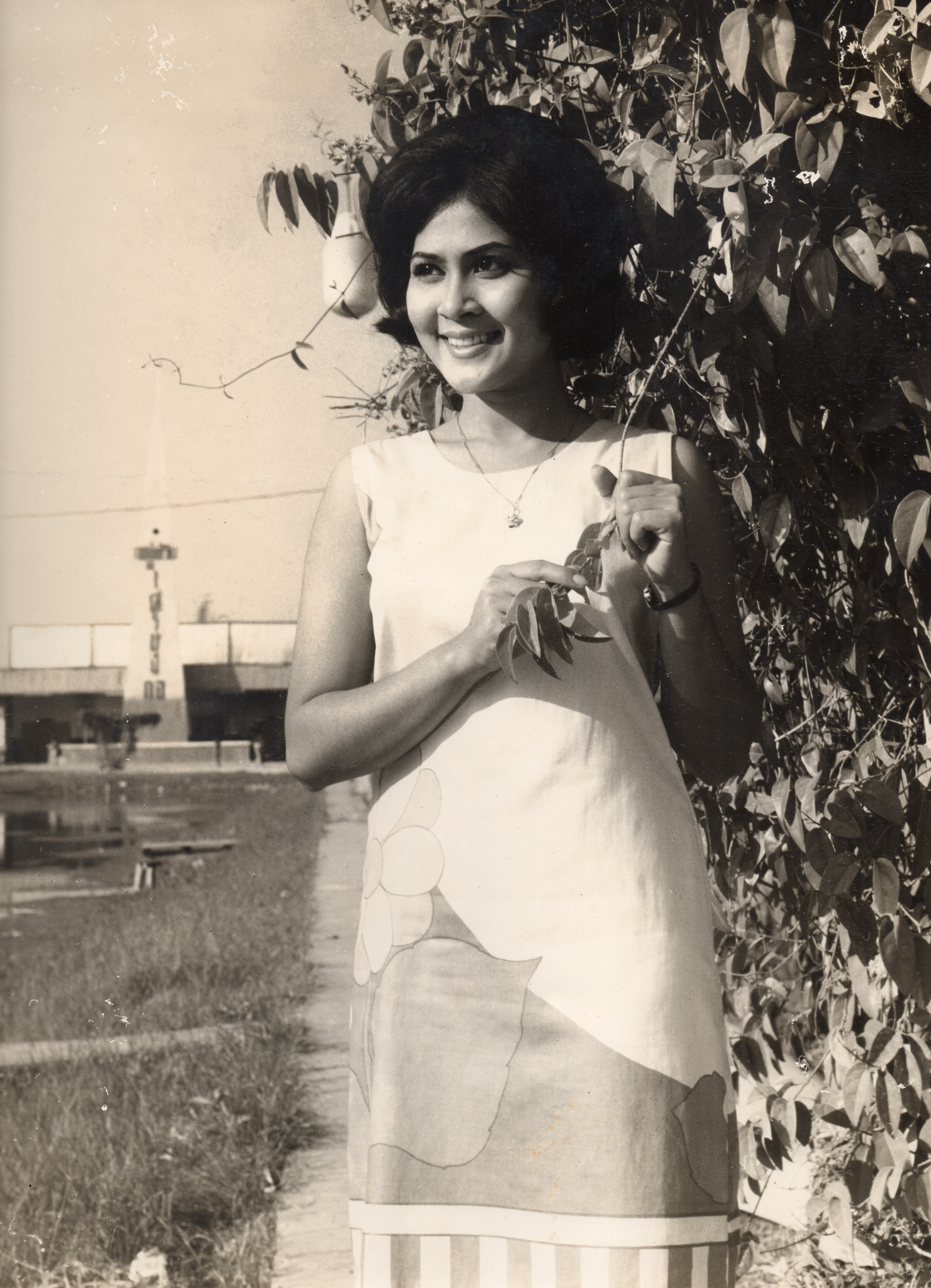 ขวัญตา บัวเปลี่ยนสี